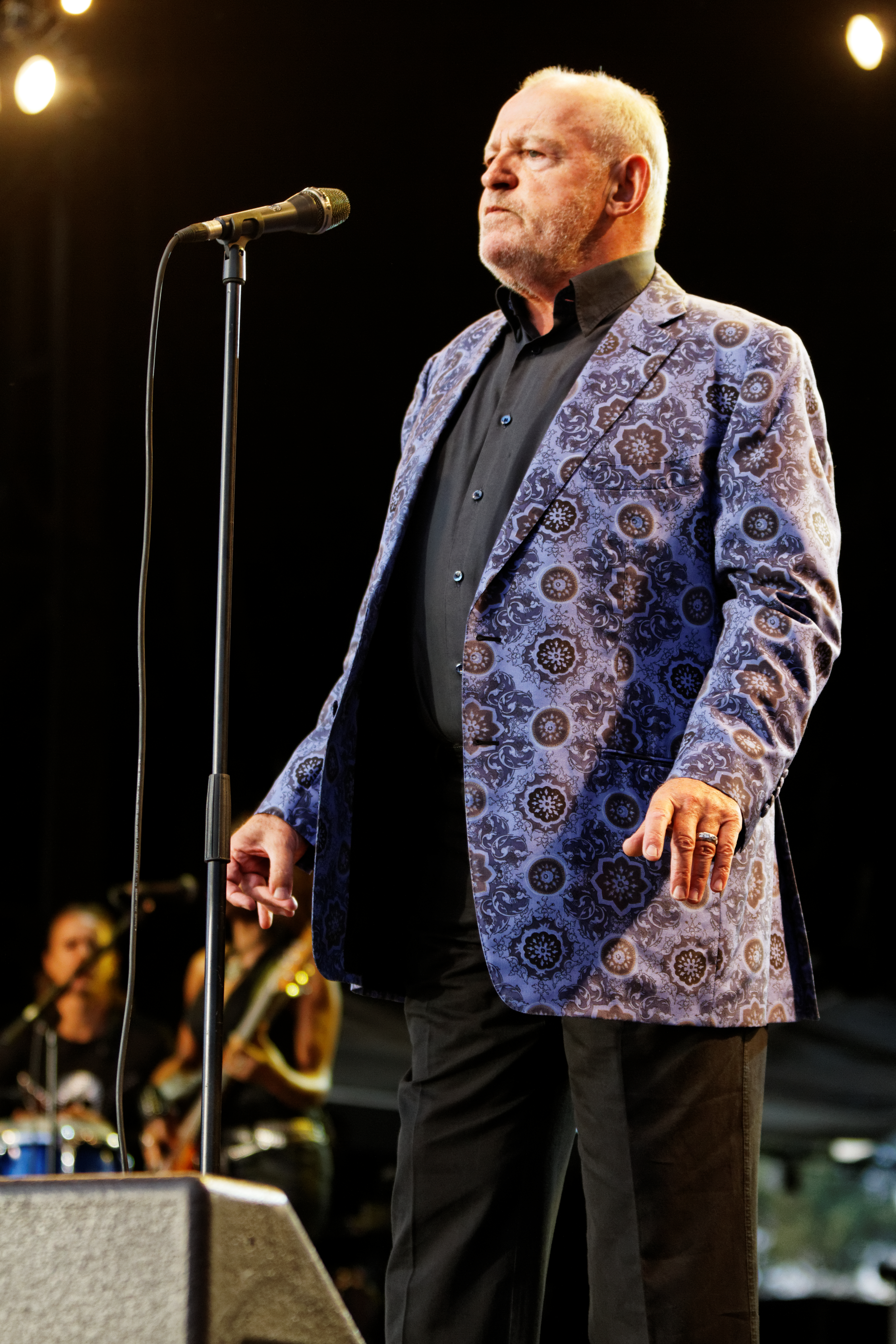 Joe Cocker en concert sur la scène Landaoudec lors du festival du bout du Monde à Crozon dans le Finistère (France).